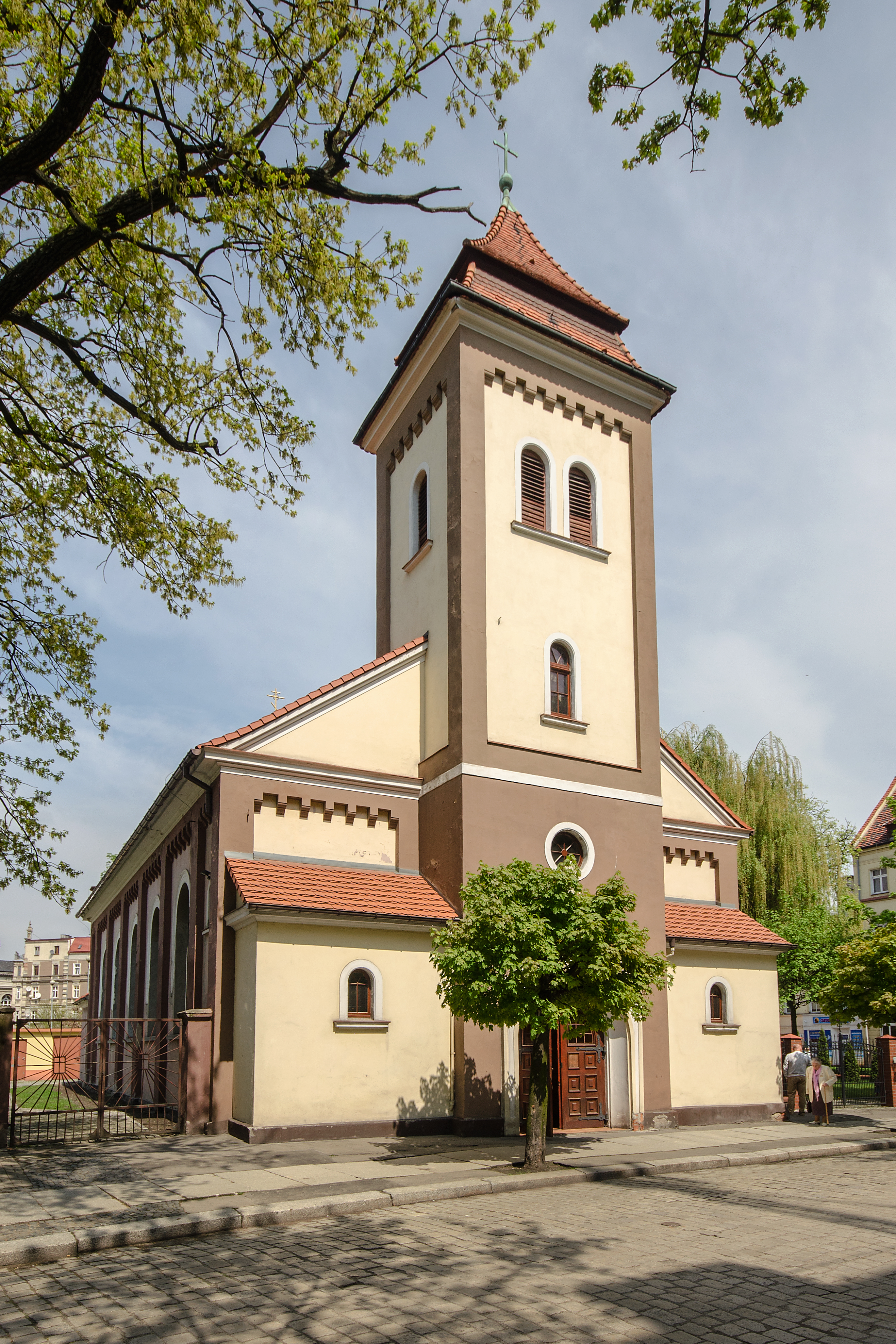 Legnica, kościół staroluterański, ob. cerkiew prawosł. par. pw. Zmartychwstania Pańskiego, 1847, 1912